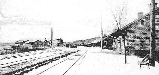 Bild på Skåre station